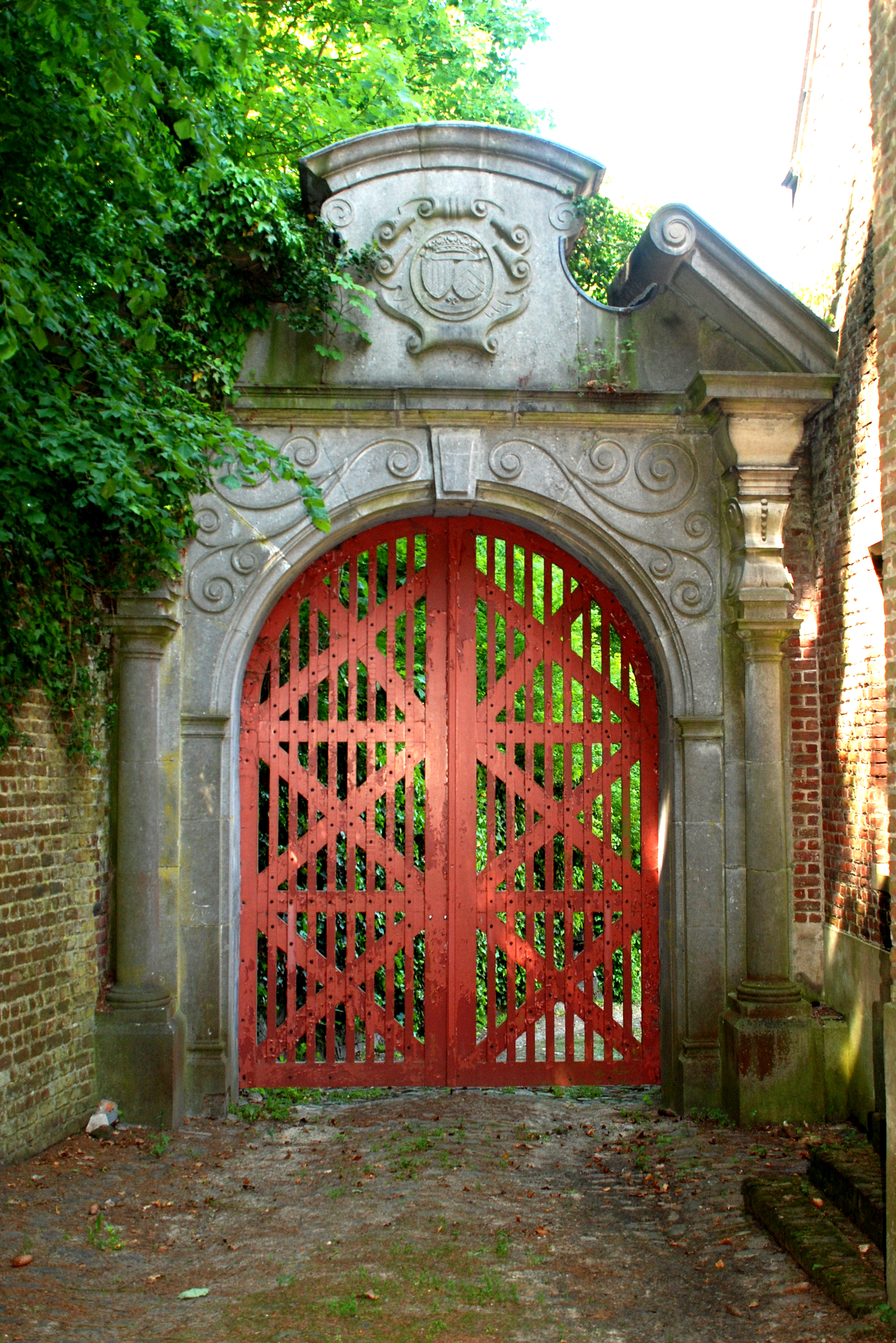 Belgique - Brabant wallon - Château de Rixensart